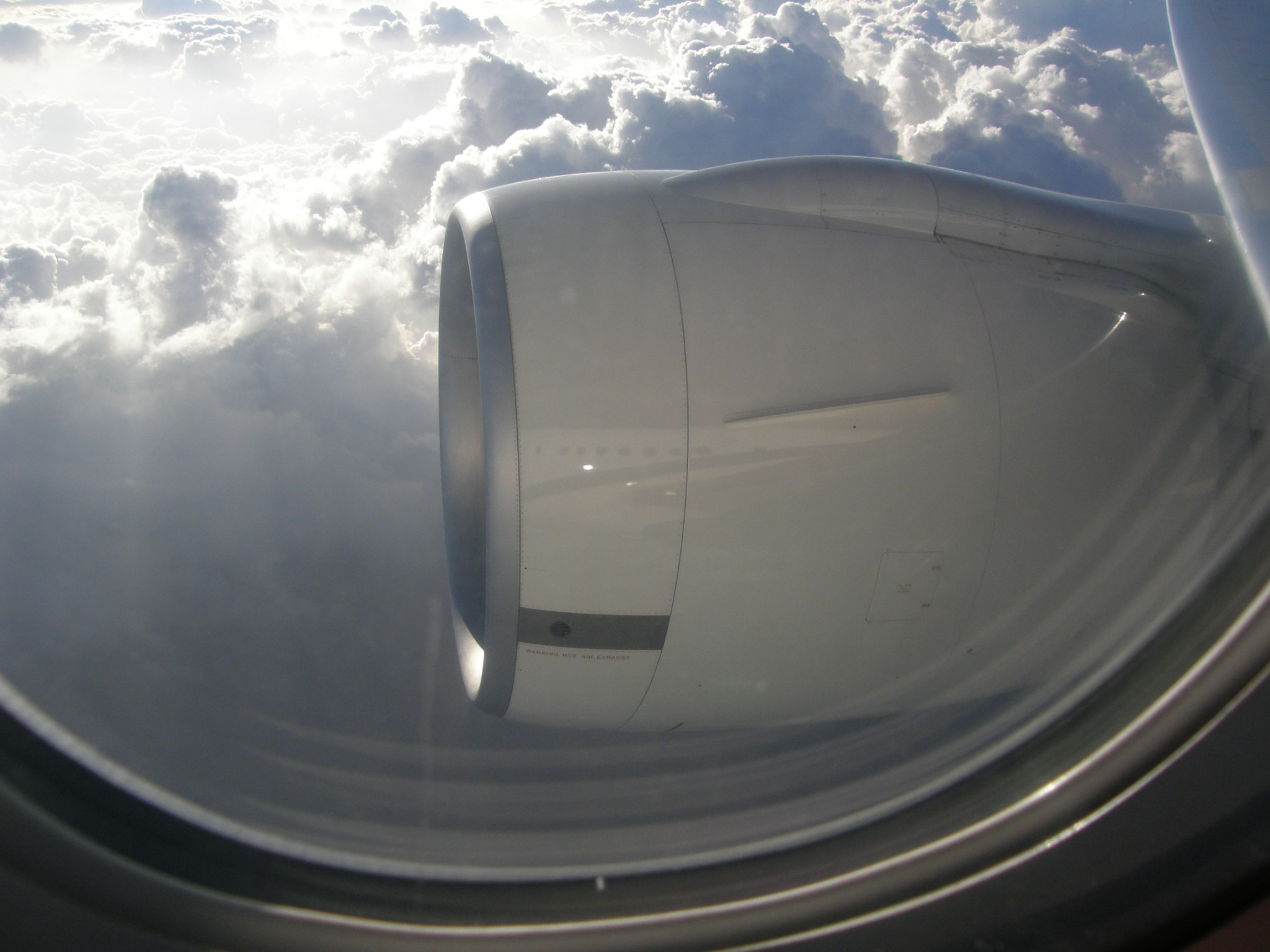 PIA 777 Engine